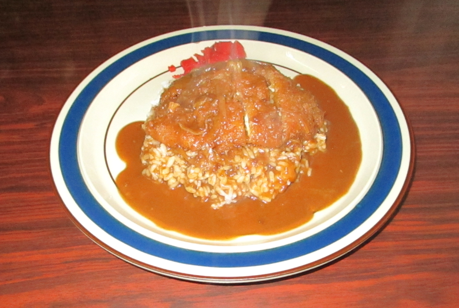 名物カツライス（大井食堂より撮影）